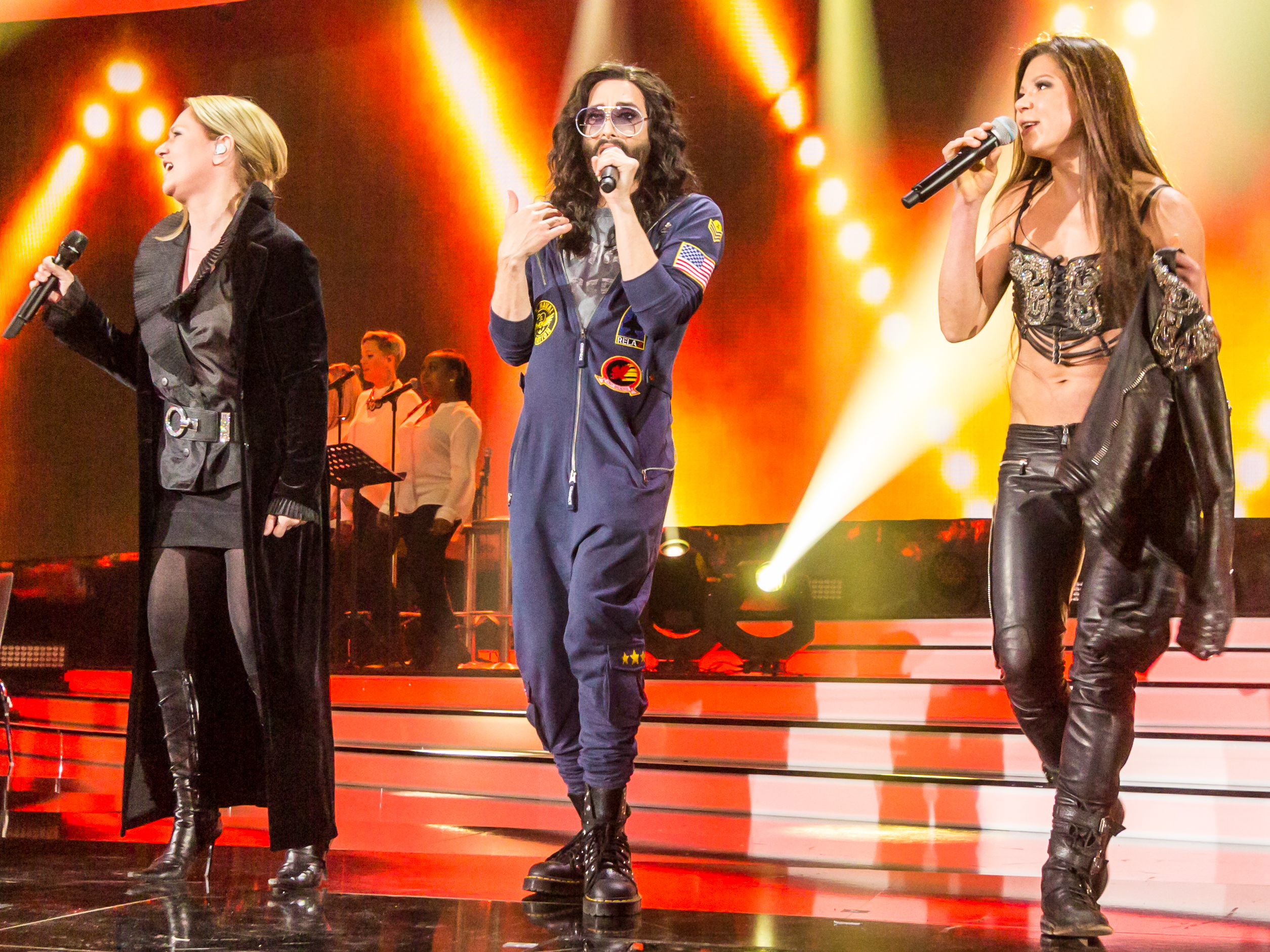 Unser Song 2017 - Generalprobe - Medley Ruslana, Nicole und Conchita